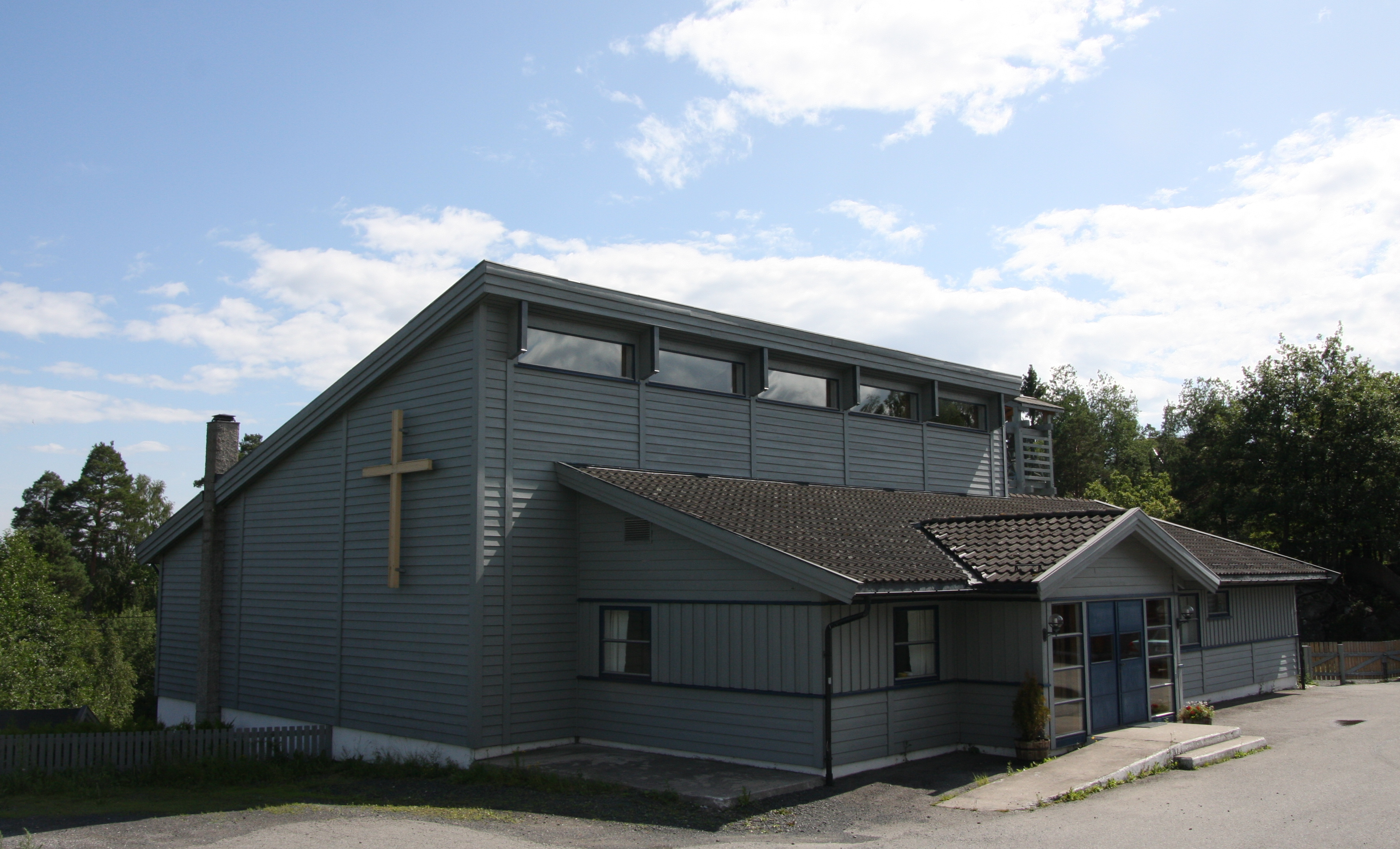 Helle kirke